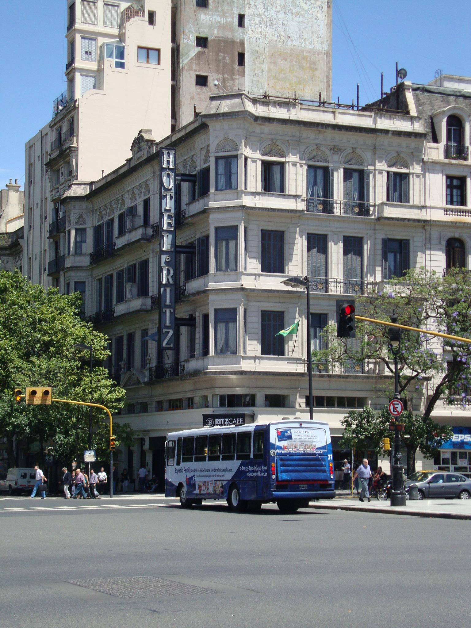 Edificio del Hotel Ritz en Buenos Aires. Avenida de Mayo, esq. Lima.